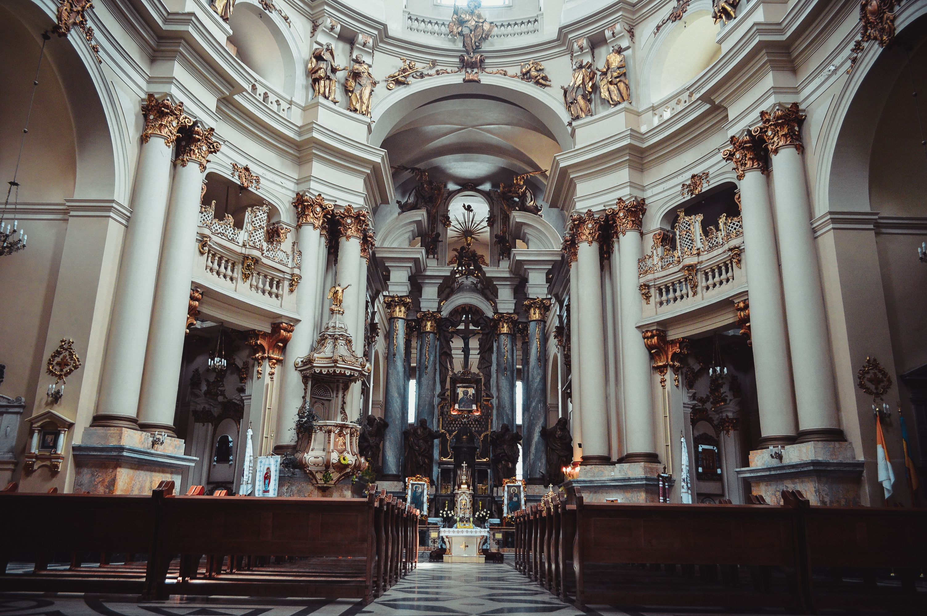 Церква Пресвятої Євхаристії, колишній костел домініканів, Львів, Музейна пл., 1